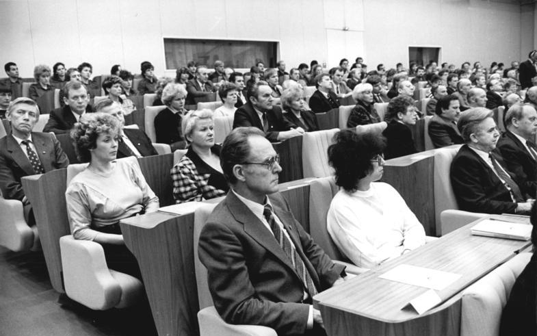 ADN-ZB/Oberst 8.11.1988 Berlin: Sondersitzung der Volkskammer Die Volkskammer der DDR gedachte auf einer Sondersitzung der Opfer der faschistischen Pogromnacht vom 9. November 1938. Unter den Teilnehmer der Abgeordnete der SED-Fraktion Gustav-Adolf Schur [1.Reihe l.].